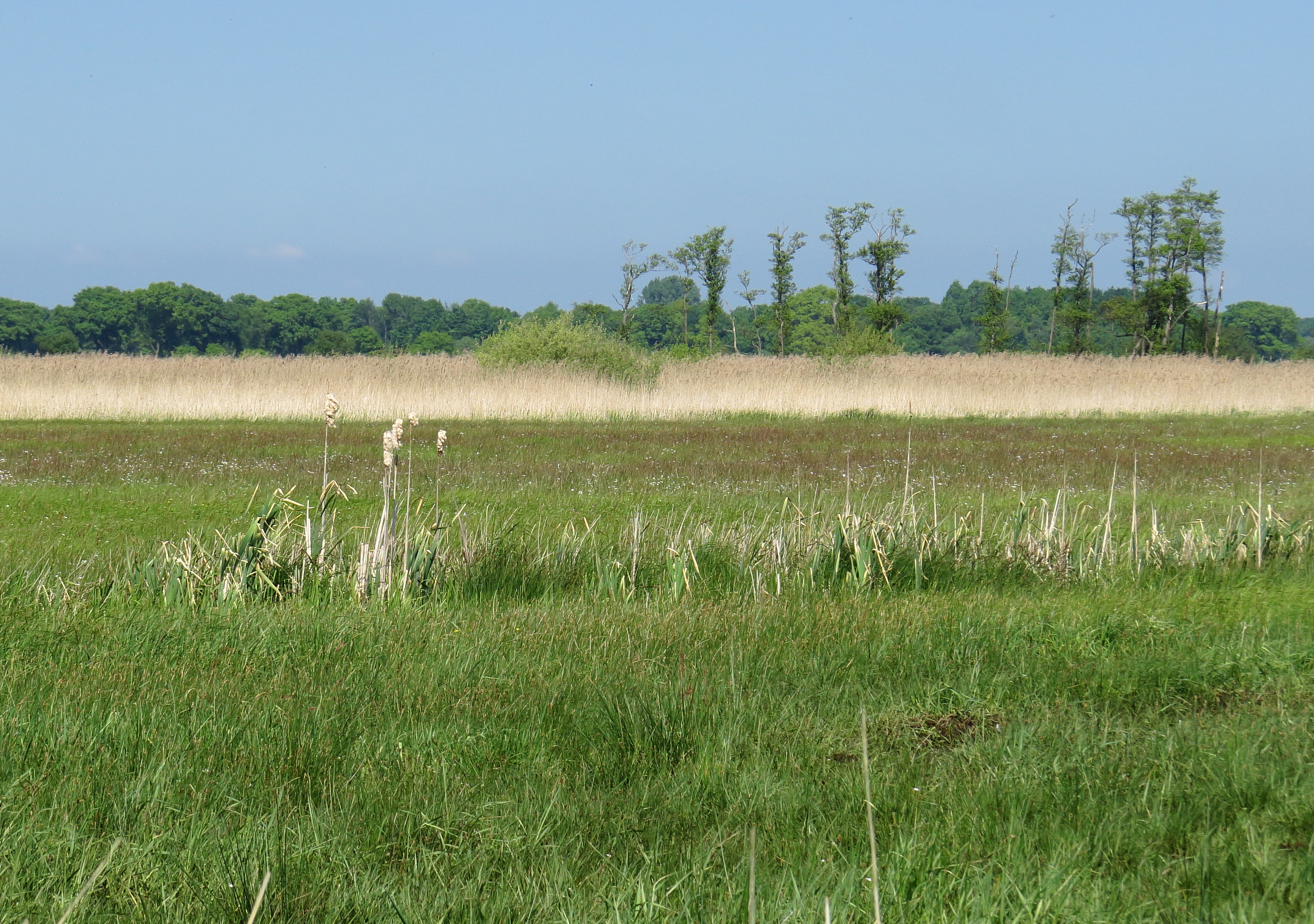 Bereich „Fleinsee/Altluneberger See“ im mittleren Bereich des Naturschutzgebiets „Geesteniederung“ nördlich von Altluneberg